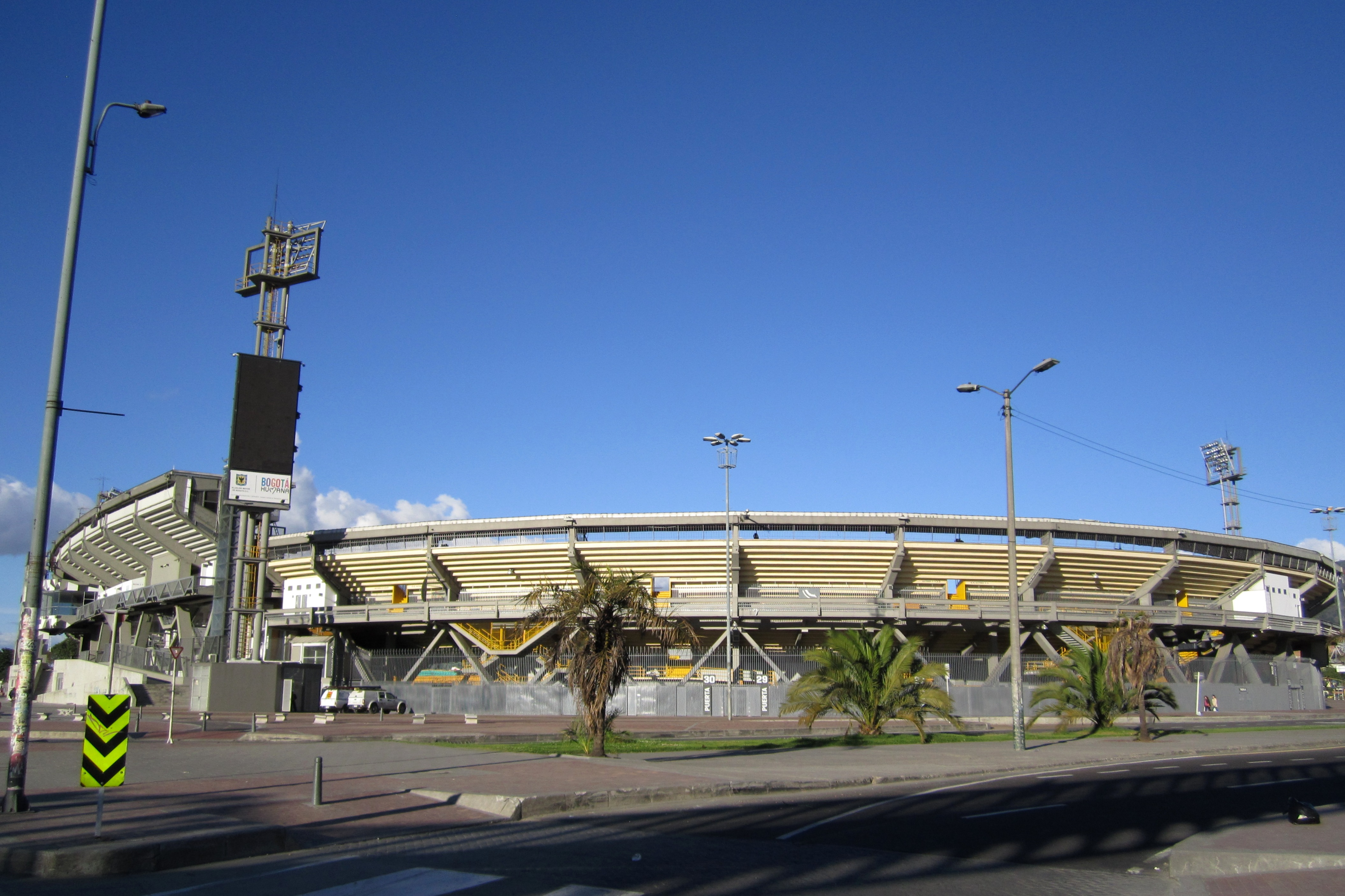 Estadio El Campin de Bogotá, costado suroccidental.